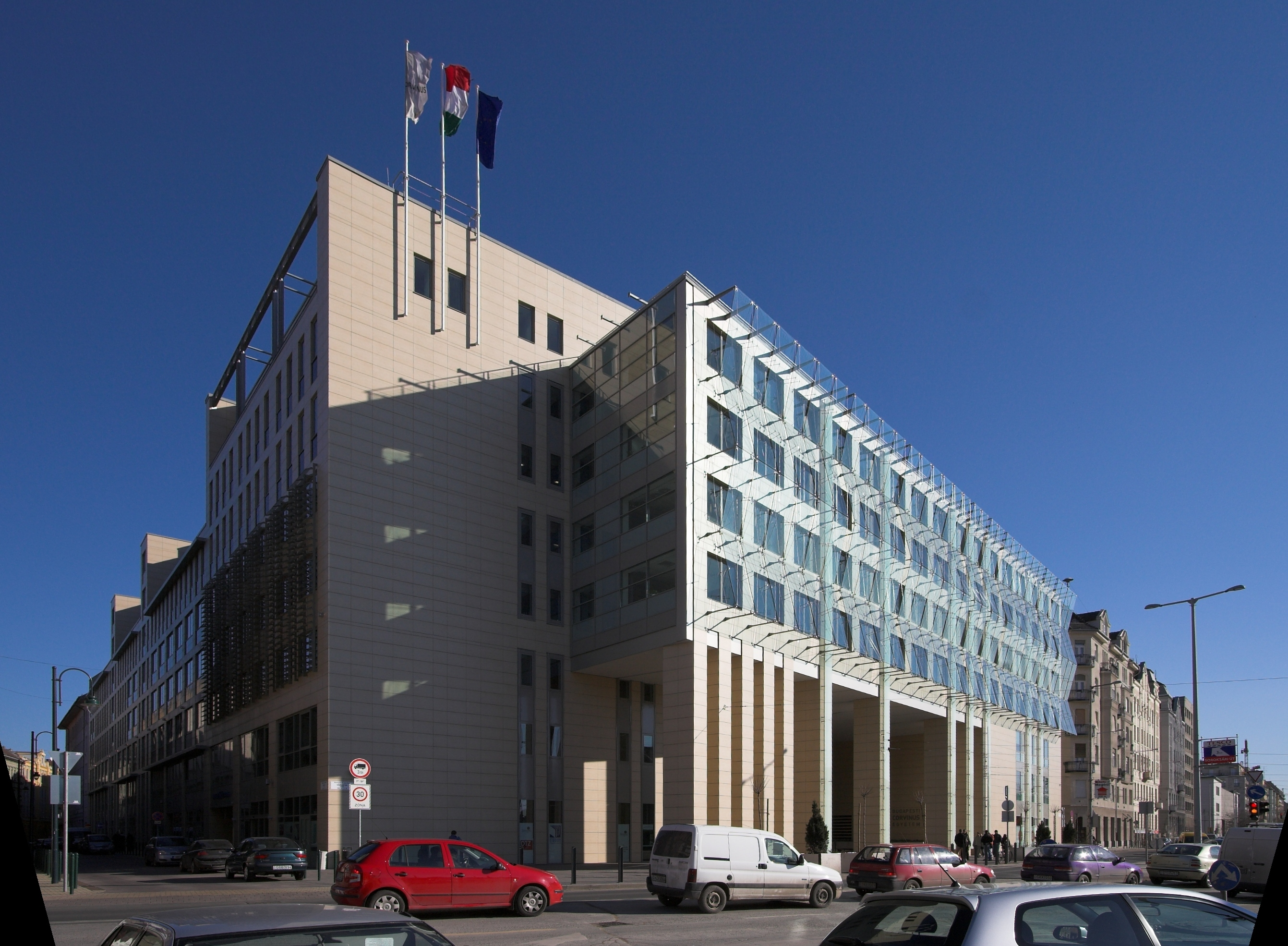 A Budapesti Corvinus Egyetem új, Közraktár utcai épülete. (Ez a kép az eredeti kép függőleges perspektív torzulásának megszüntetésével keletkező képből kivágással készült.)